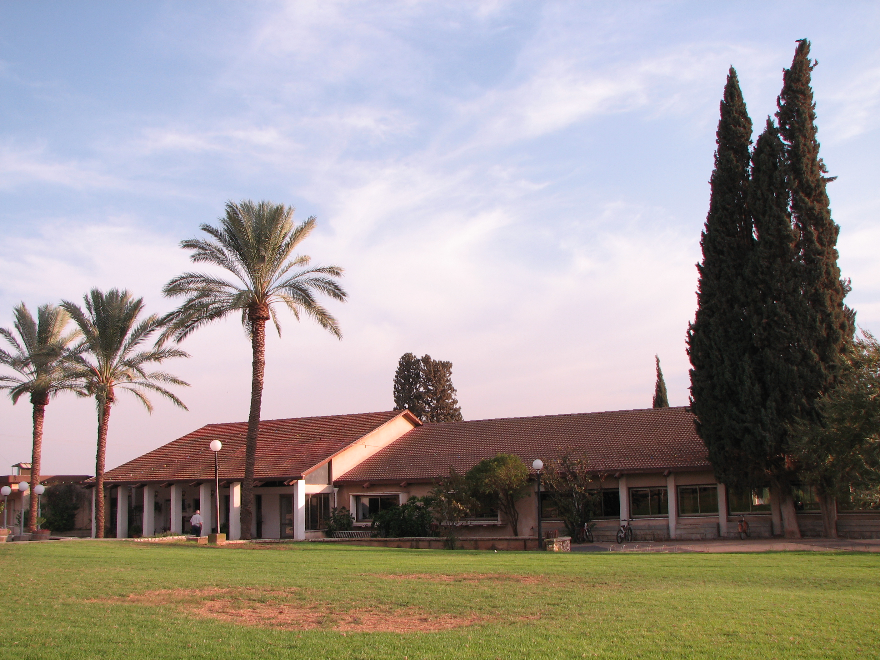 חדר האוכל של גבע